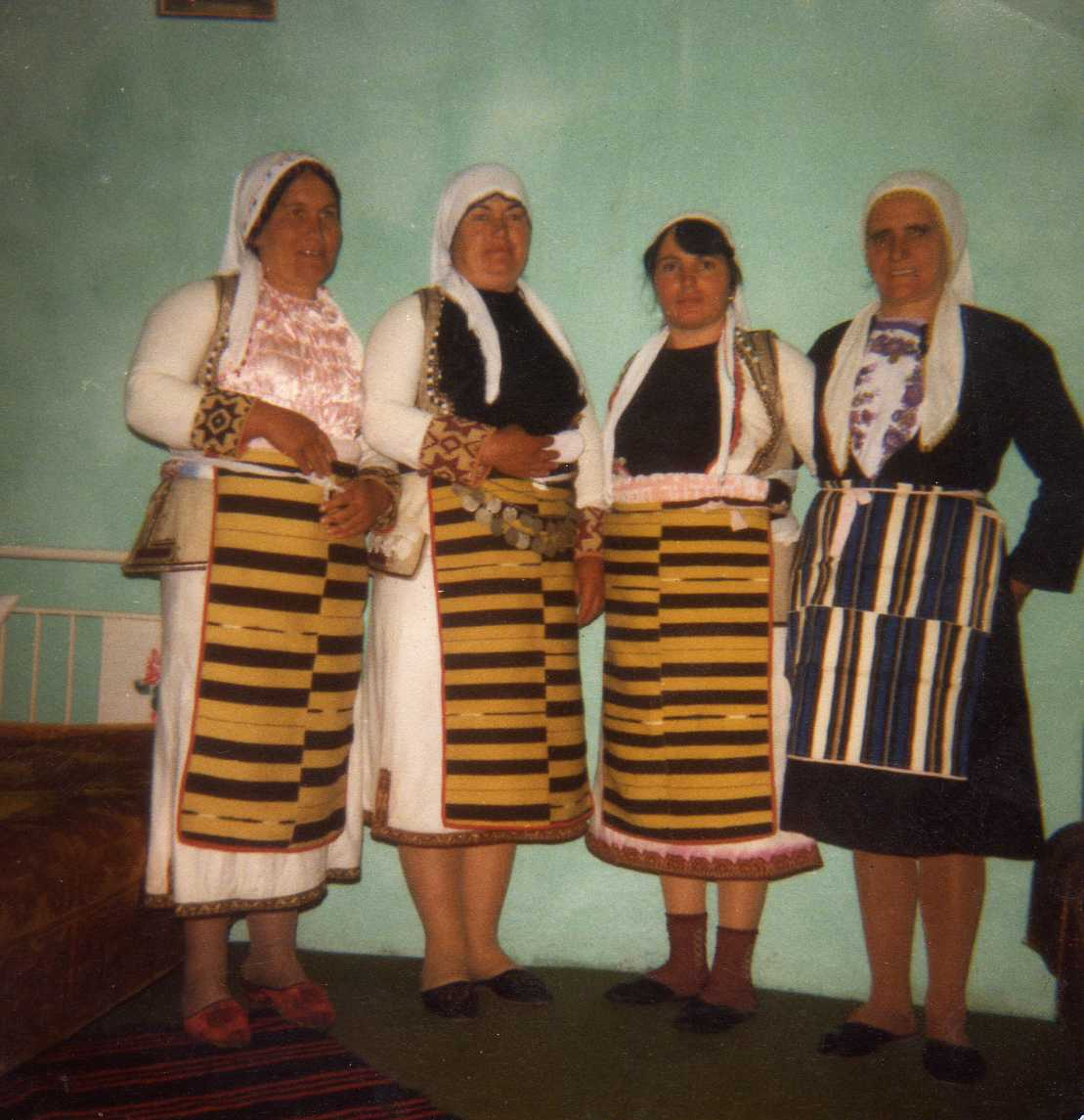 Женска брсјачка носија